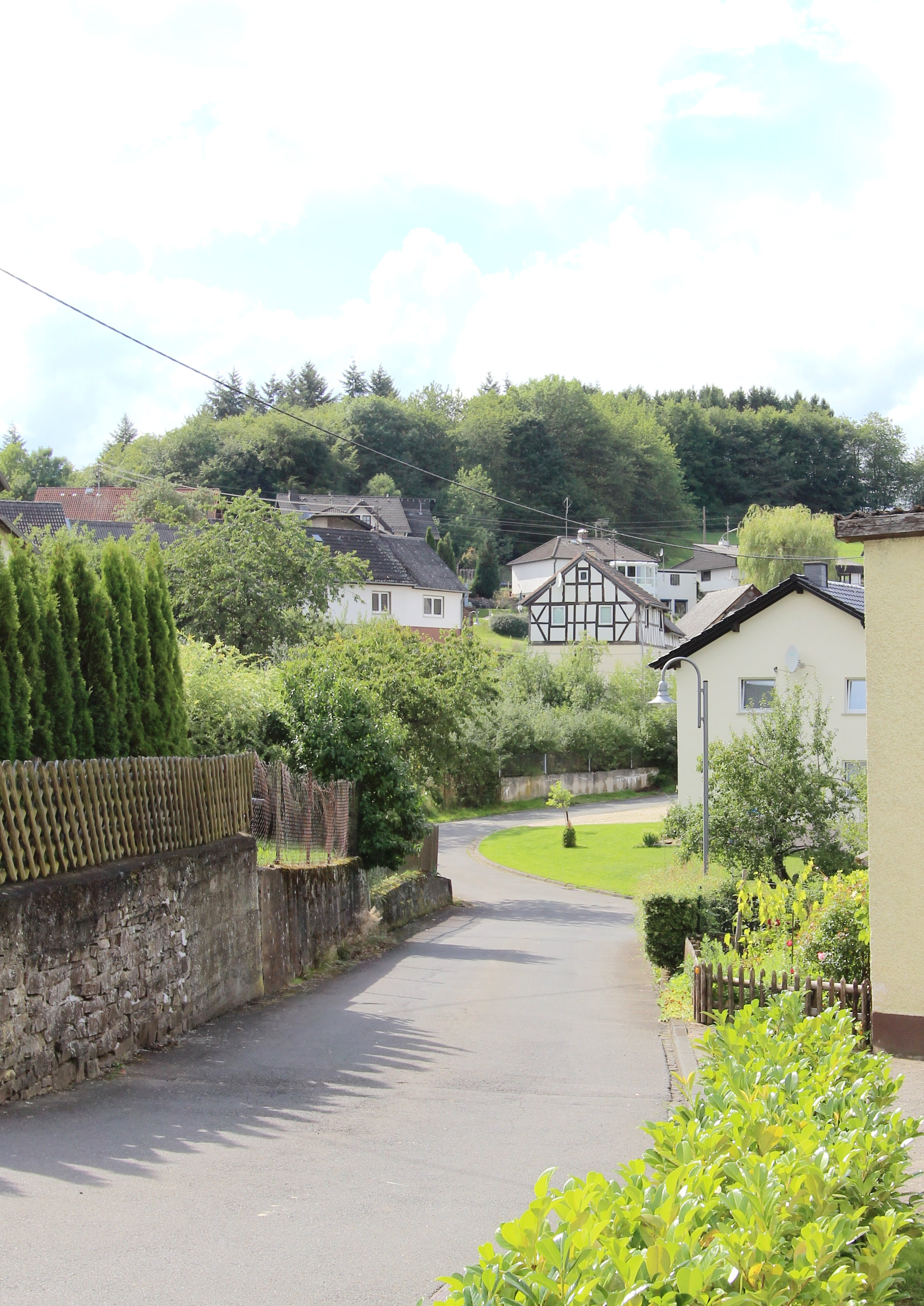 53518 Wimbach, Breitenweg. Aufnahme von 2017.